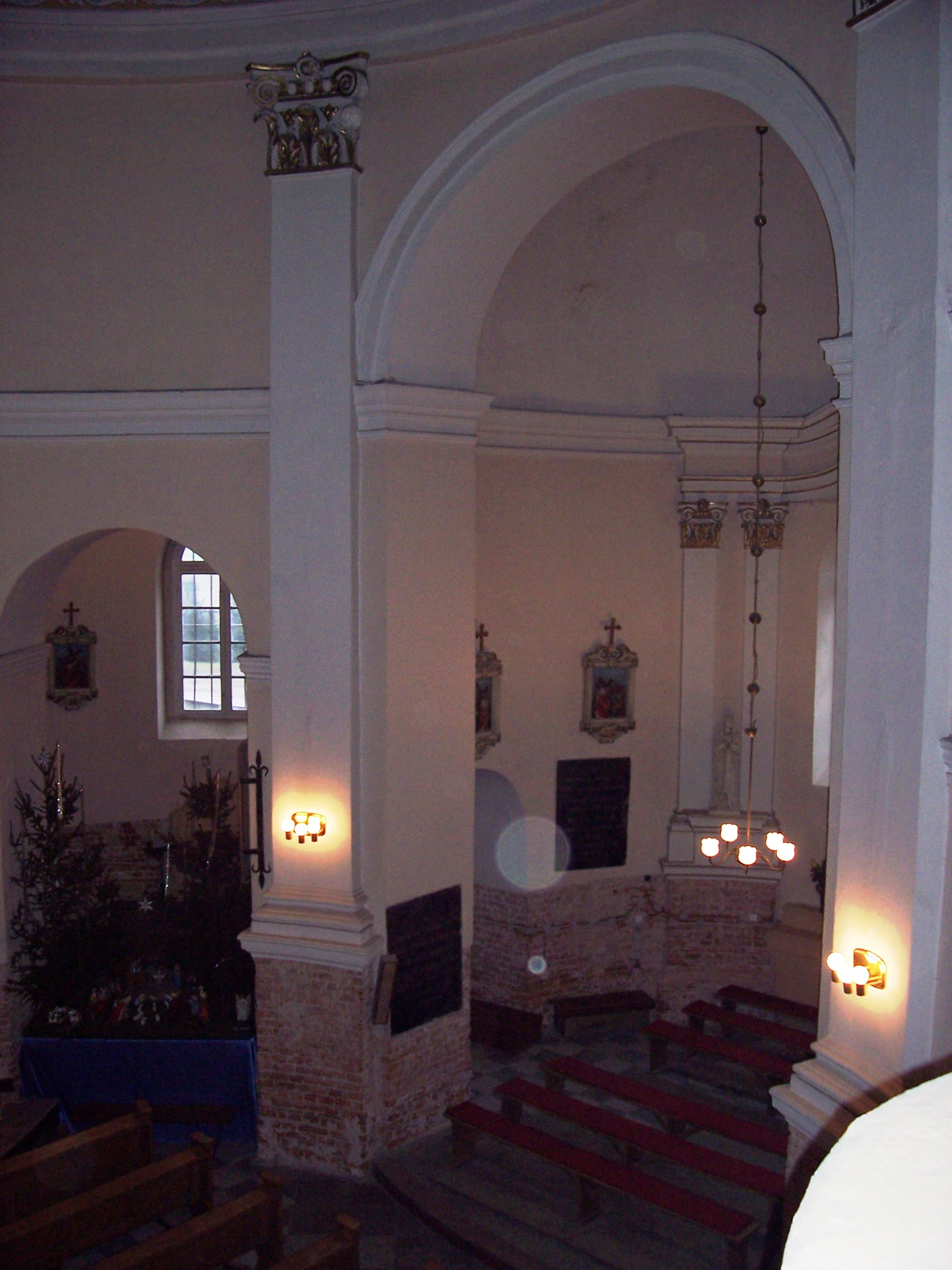 Zdjęcie mojego autorstwa wykonane 30 listopada 2004 przedstawia wnętrze kościoła parafialnego w Parkowie.